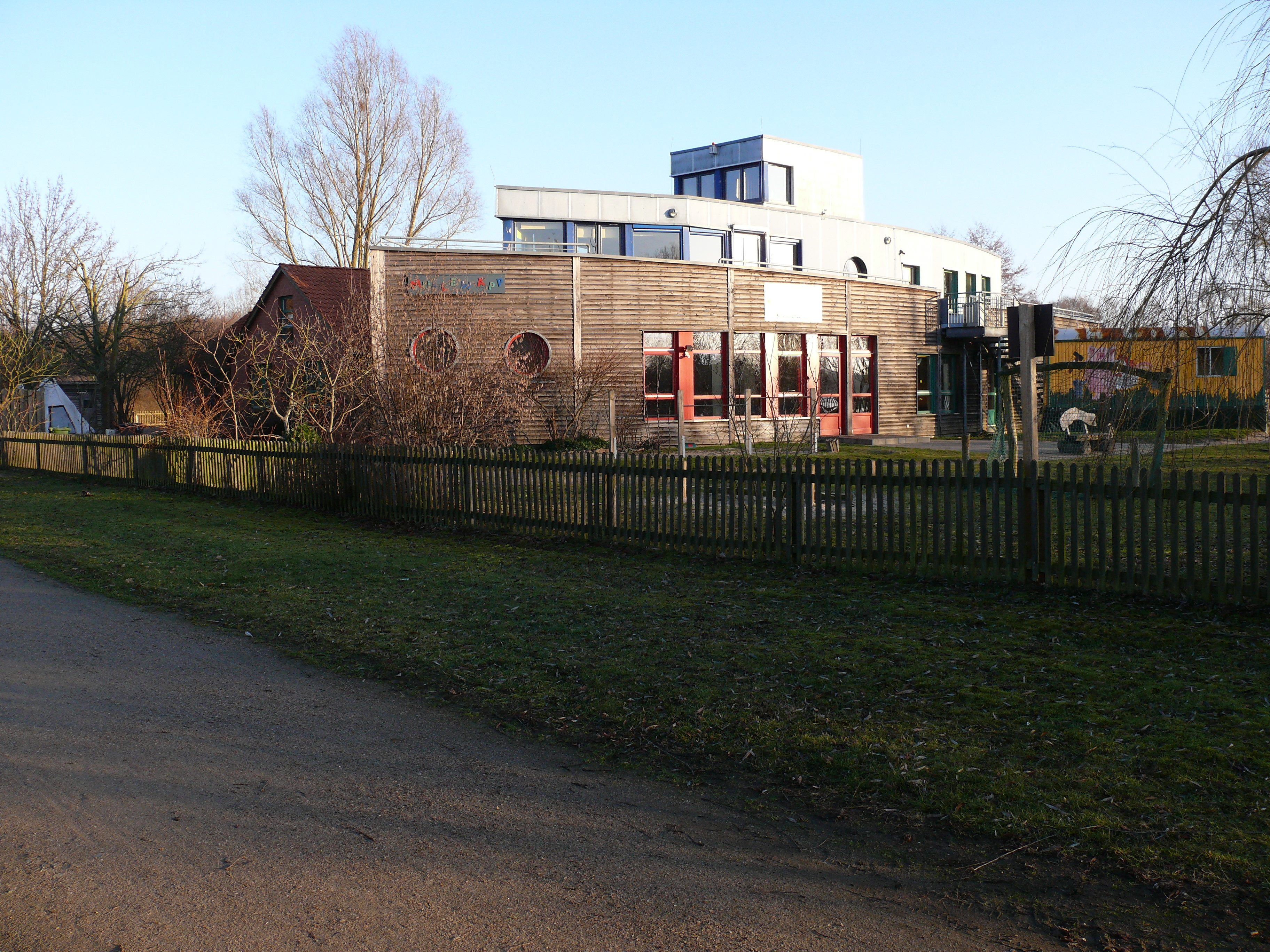 Die Mullewapp-Kindertagesstätte, in der Form eines Schiffes, am Thielenburger See in Dannenberg (Elbe).